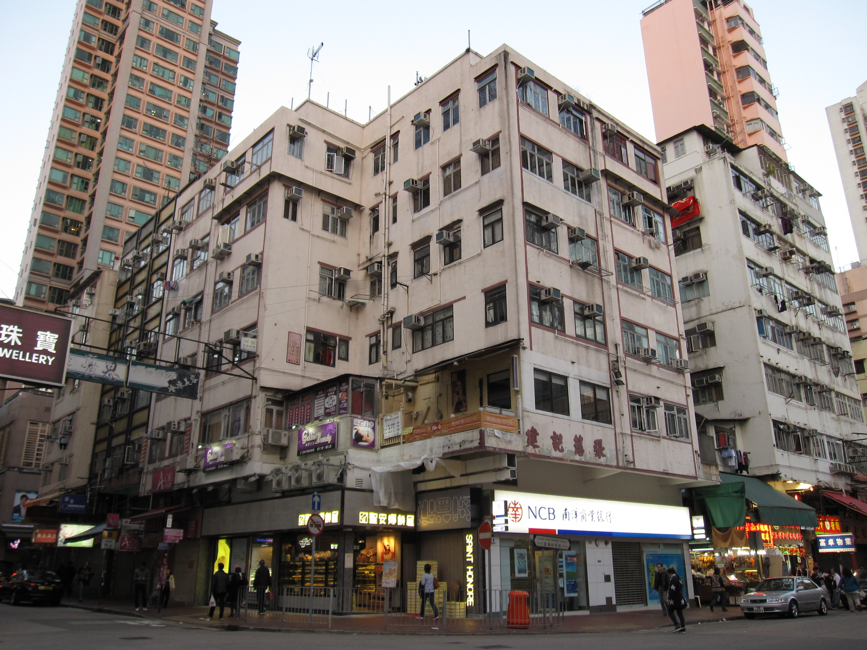 中文（香港）: 德仁樓第四期。